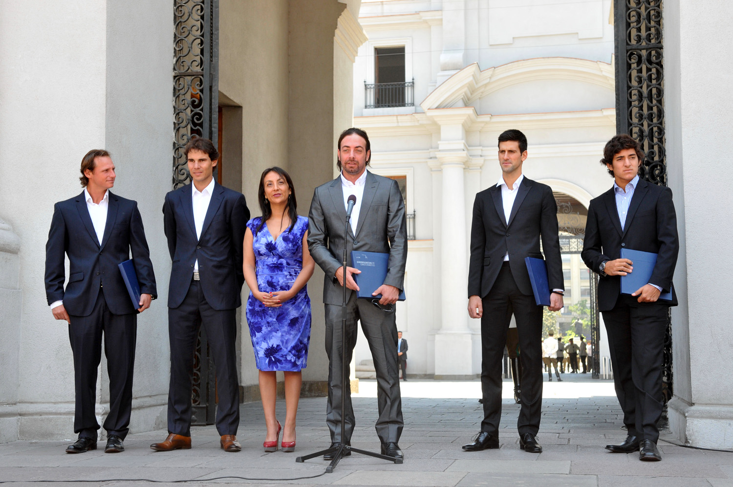 Nicolás Massú en conferencia en La Moneda.